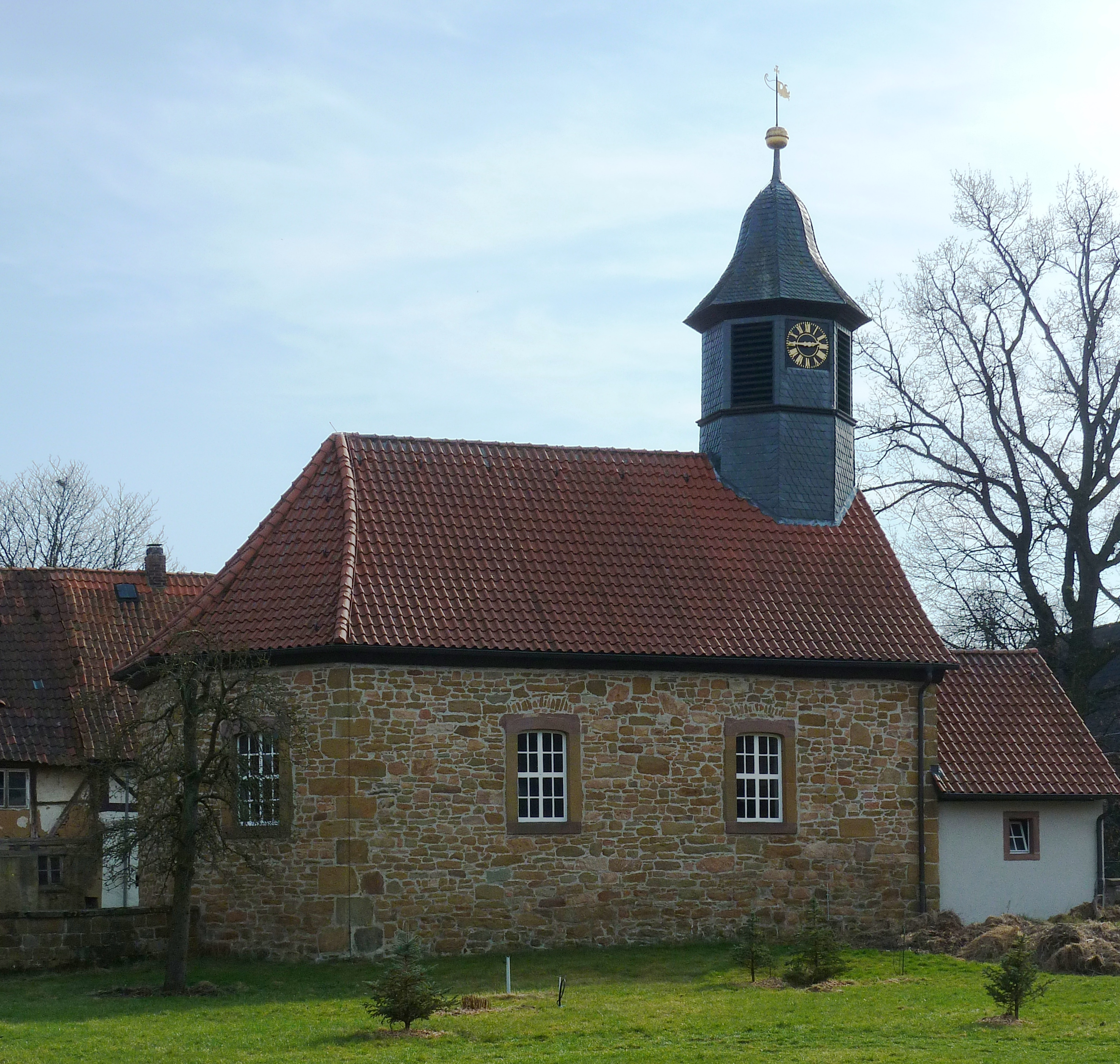 Ev. Kapelle in Strodthagen, Stadt Einbeck, Südniedersachsen. Erbaut 1717-41